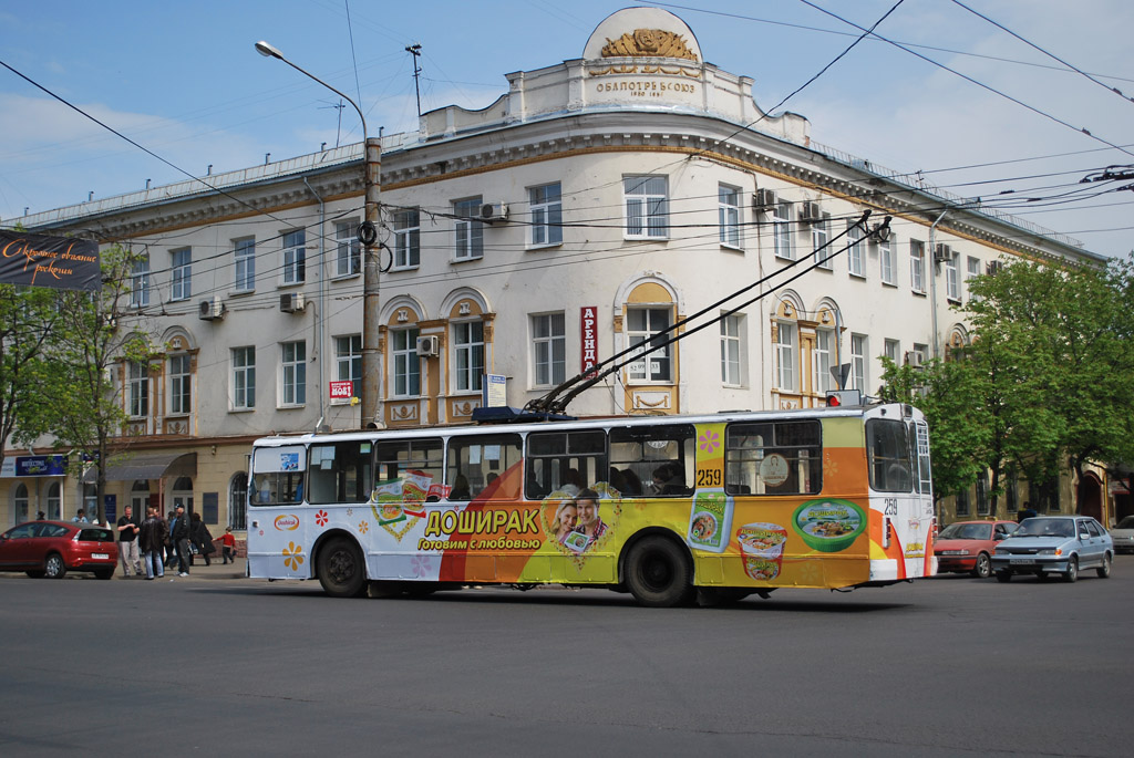 Троллейбус движется по улице Плехановской в сторону Северного р-она, Воронеж